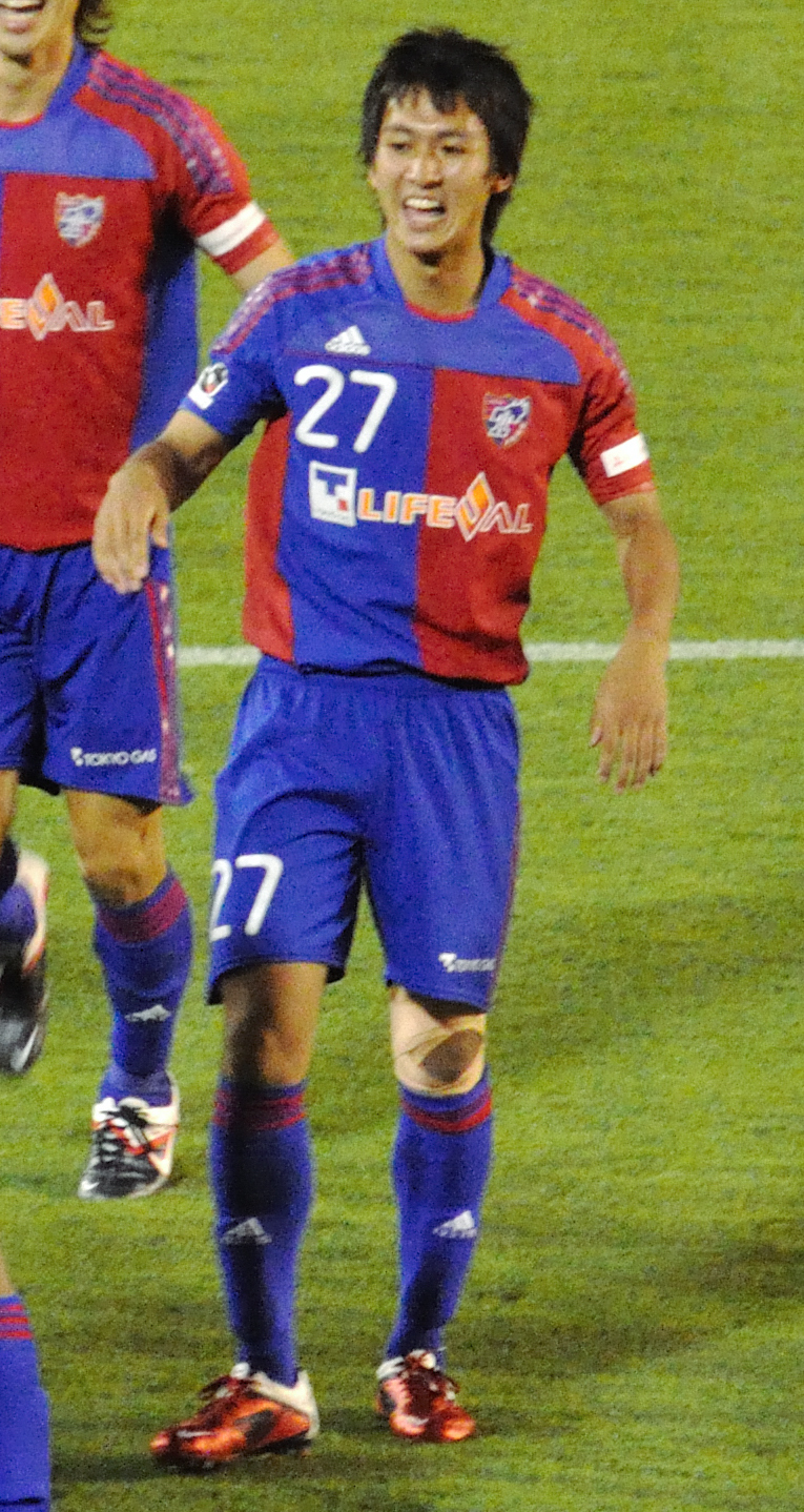 Sotan Tanabe